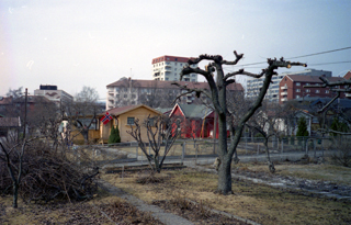 Rodeløkkens kolonihager, allotment garden.